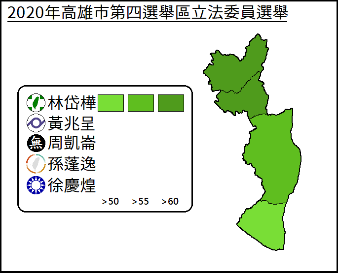 2020年高雄市第四選舉區立法委員選舉得票